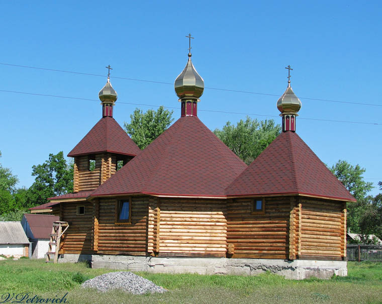 Фото сделано когда я был в селе Мурафа.